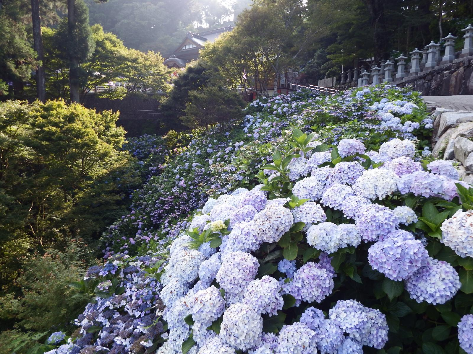 雲辺寺の紫陽花